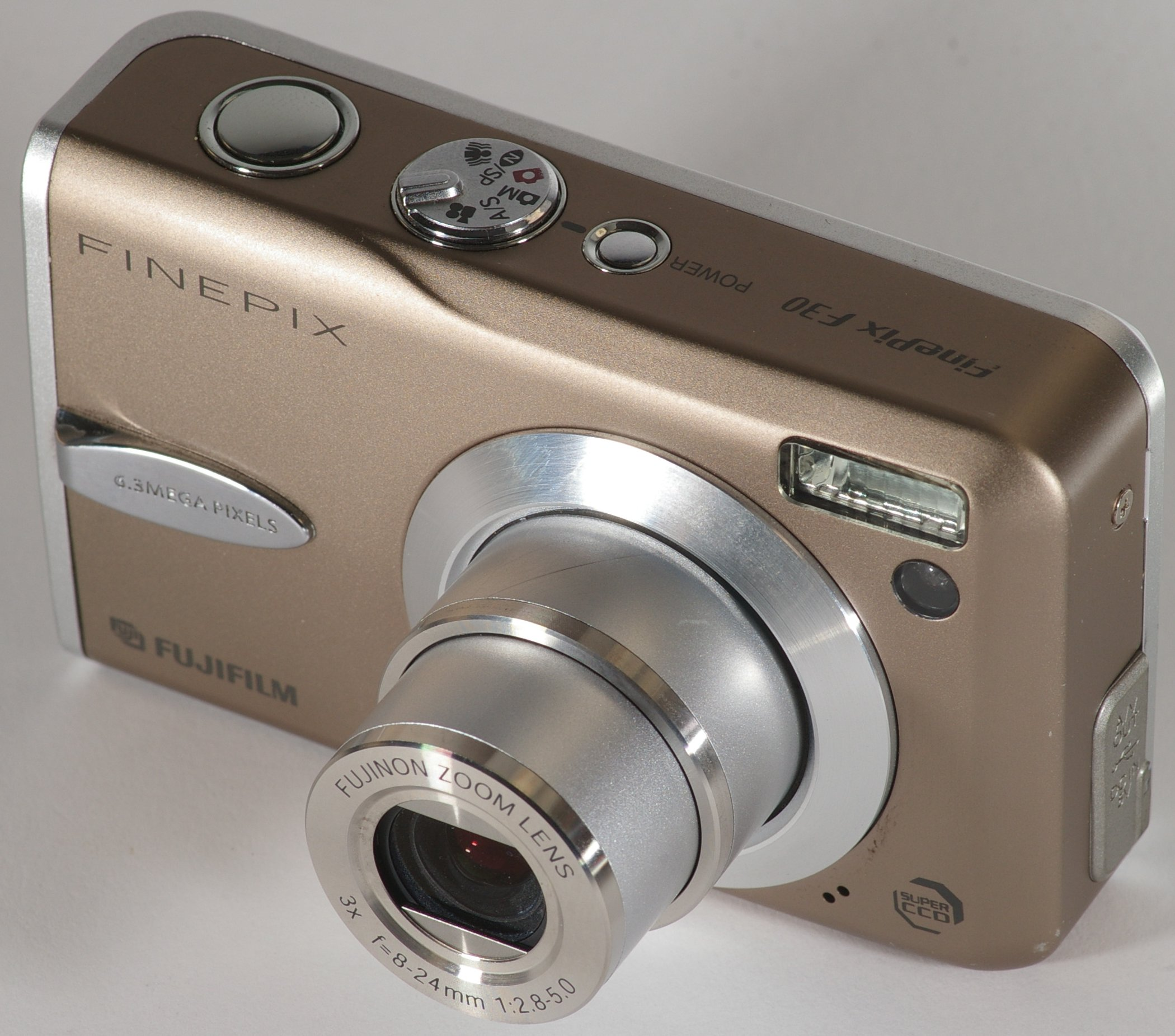 A Fujifilm Finepix F30 camera